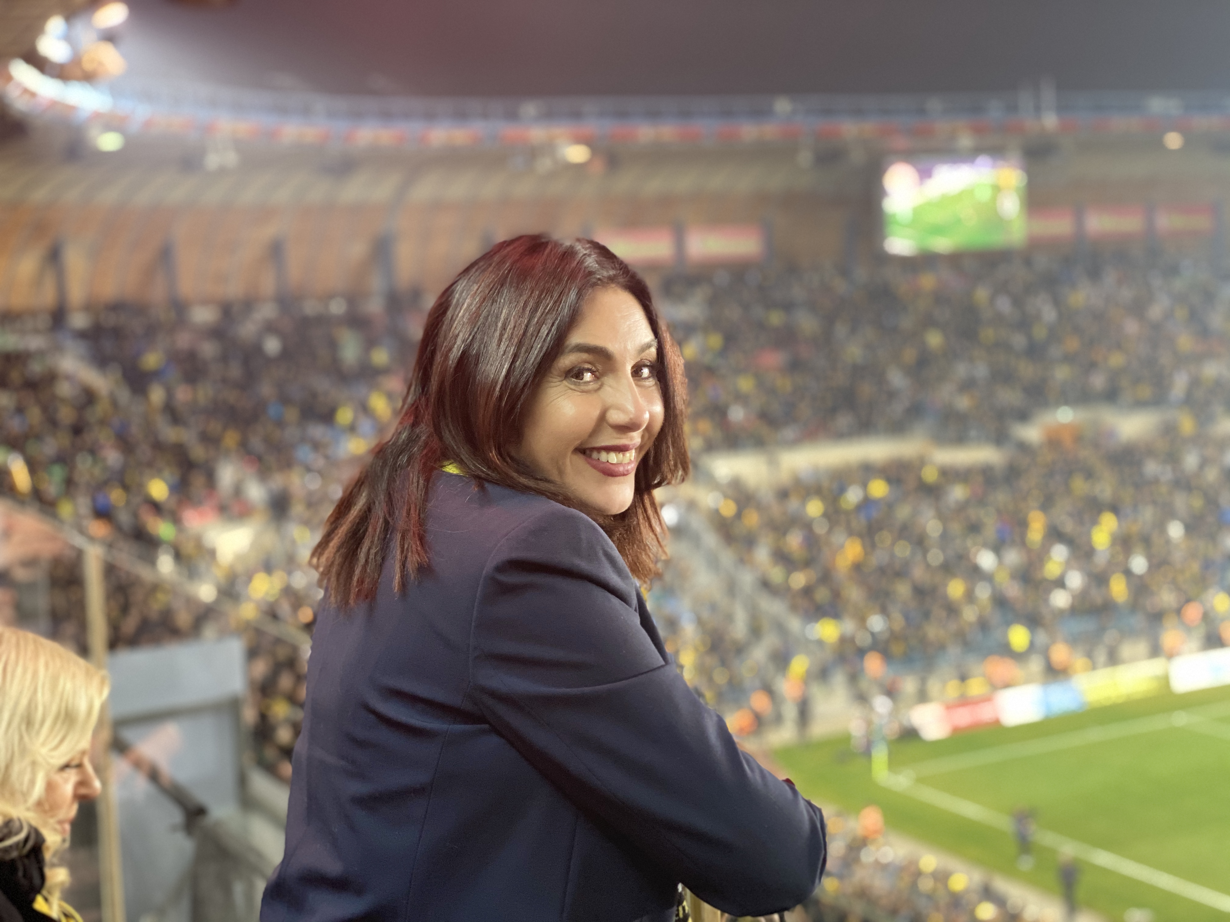 מירי רגב, באיצטדיון טדי, ירושלים, פברואר 2020